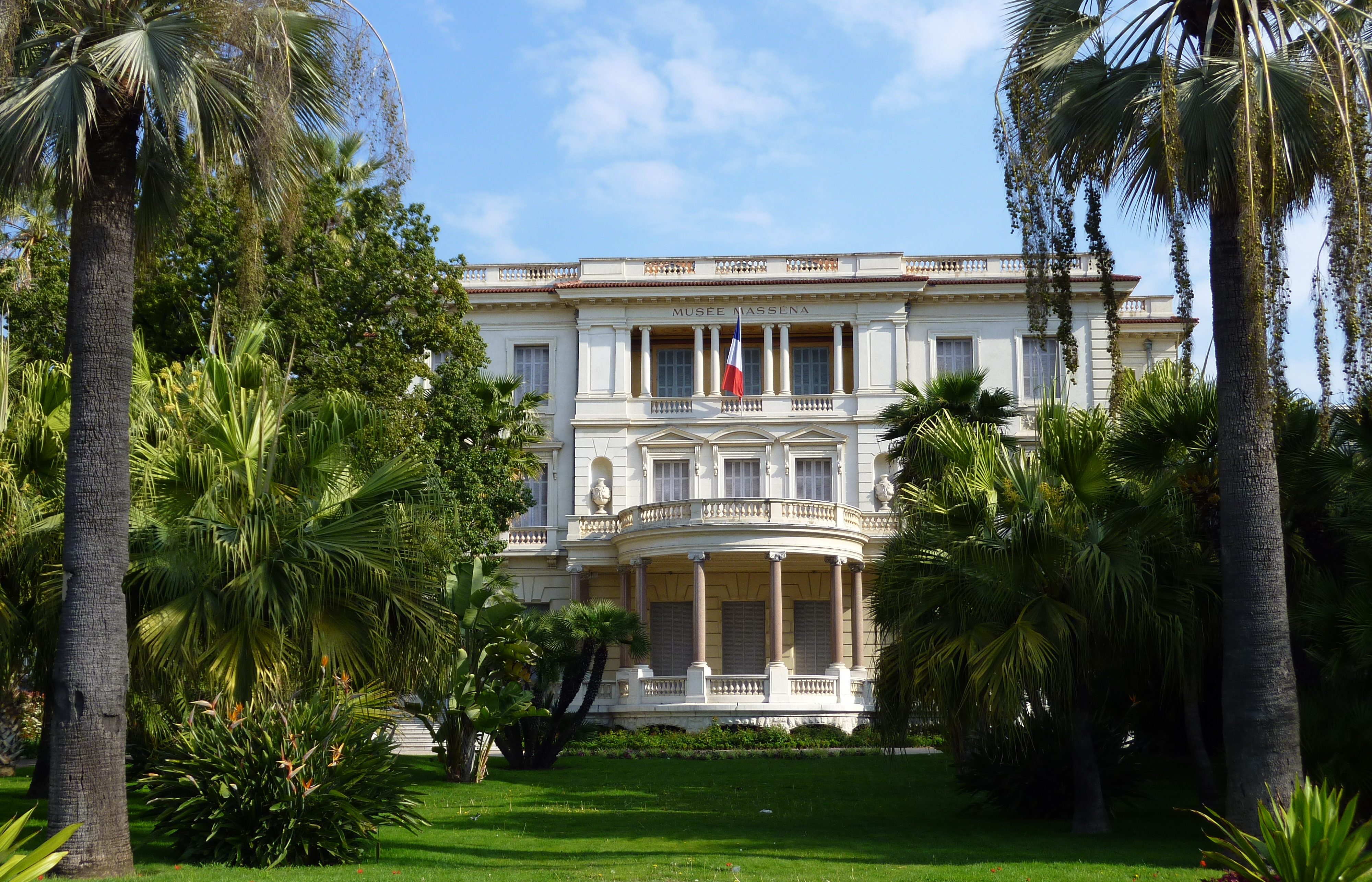 Façade de la Villa Masséna (actuel Musée Masséna) à Nice, (Alpes-Maritimes, France)